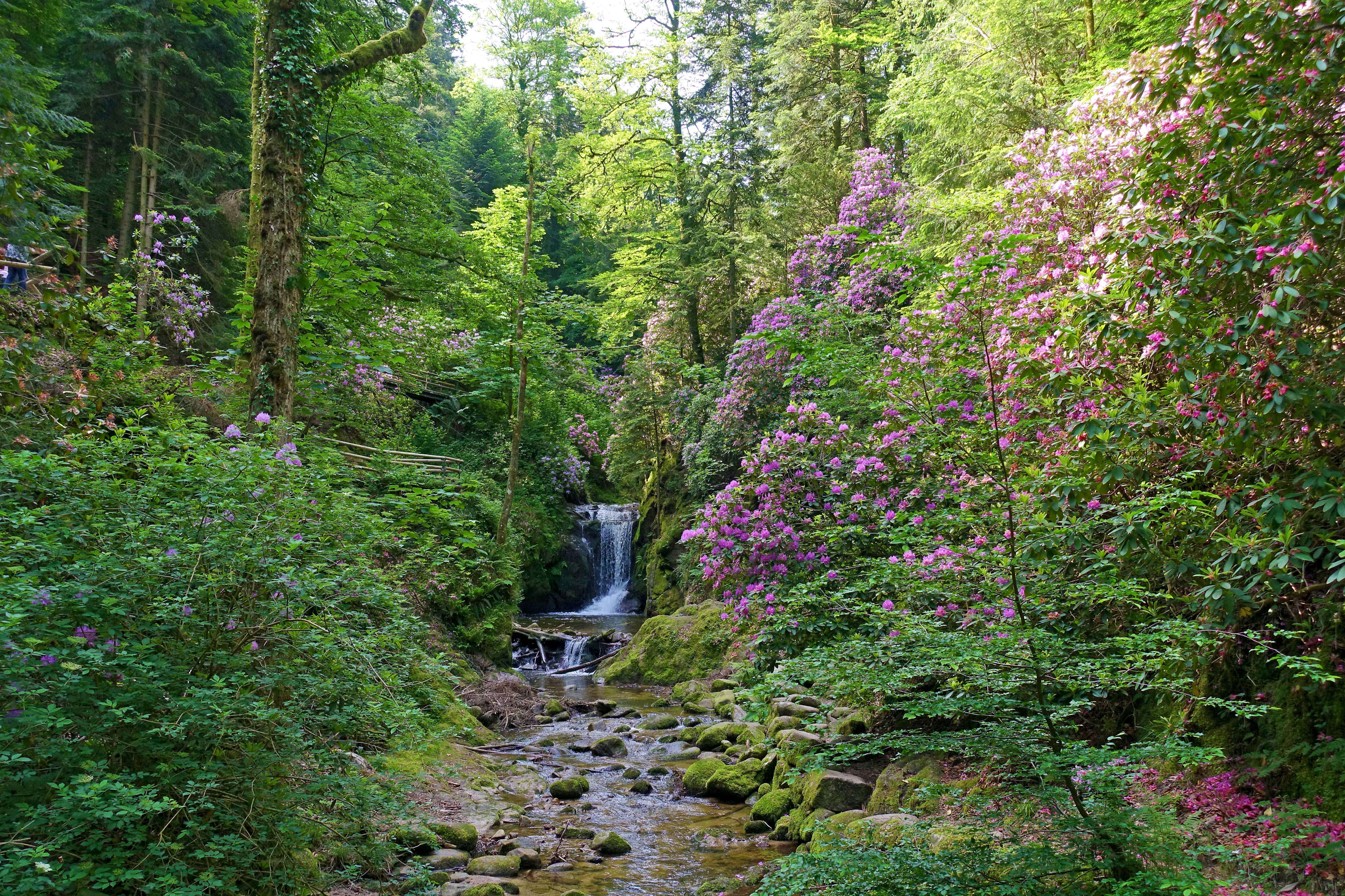 Geroldsauer Wasserfall zur Rhododendronblüte 26.5.2018